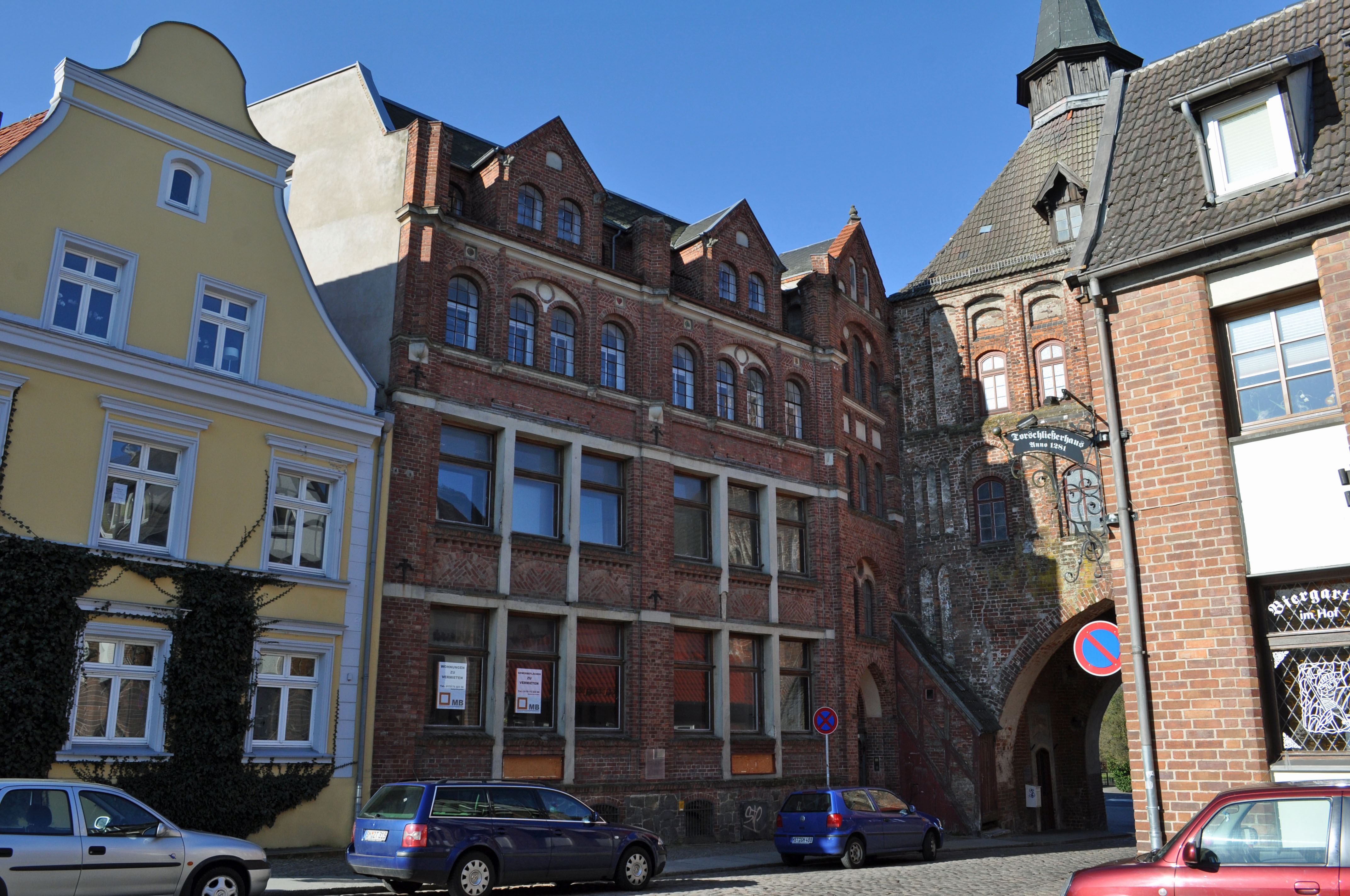 Gebäude bzw. Gebäudedetail in Stralsund. Straße und Hausnummer siehe Dateiname.